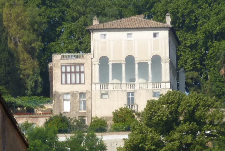 Roma, via S. Francesco di Sales. L'insegna della Casa della Memoria e della Storia e sullo sfondo villa Lante al Gianicolo.